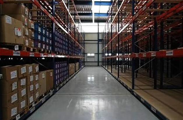 Фото мобильной конструкции